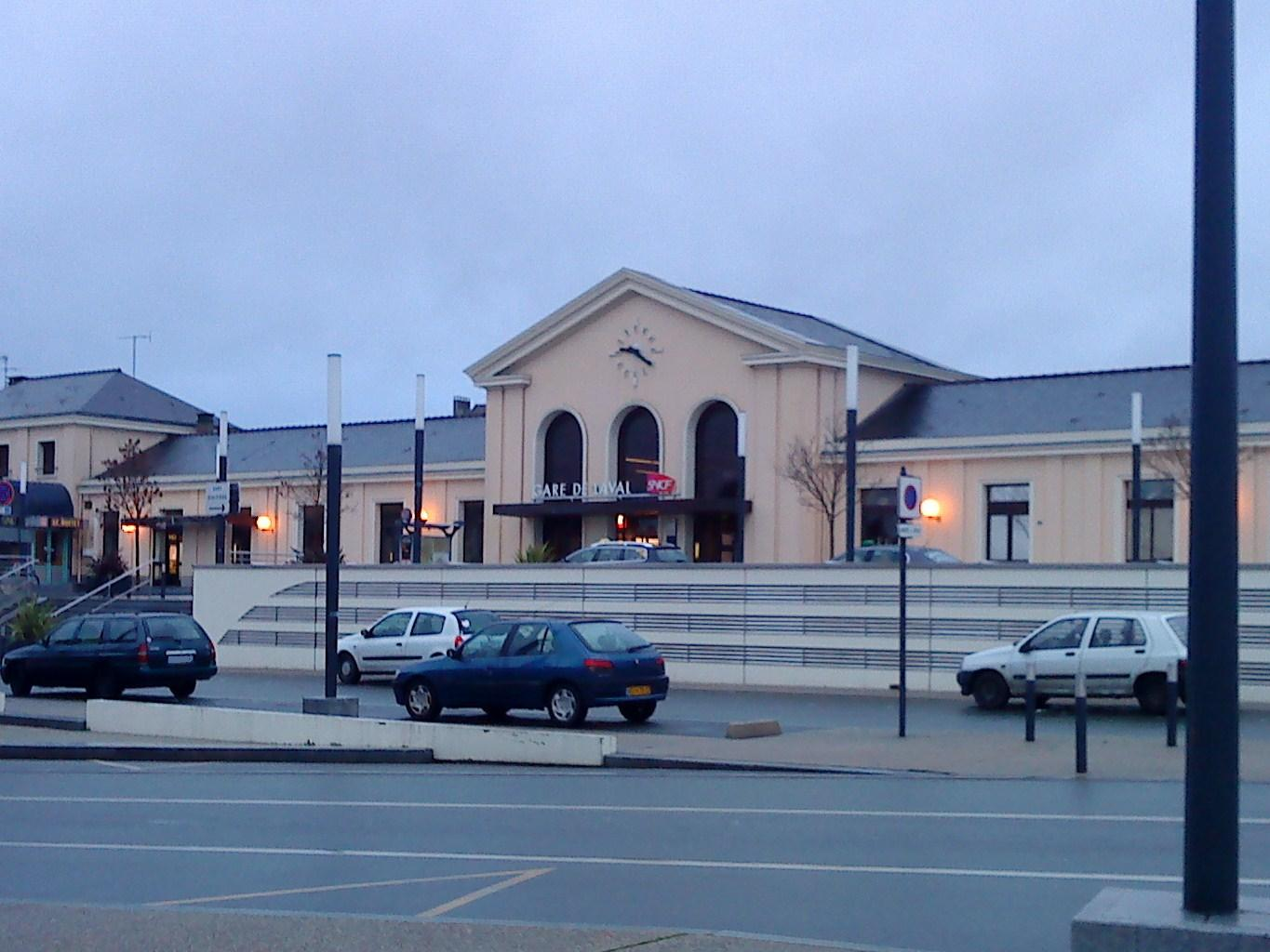 Façade du bâtiment voyageurs de la gare de Laval (Mayenne, France)